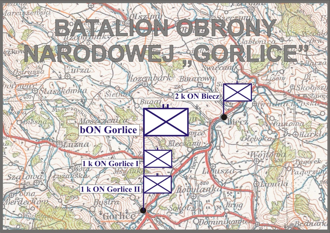 Batalion ON Gorlice